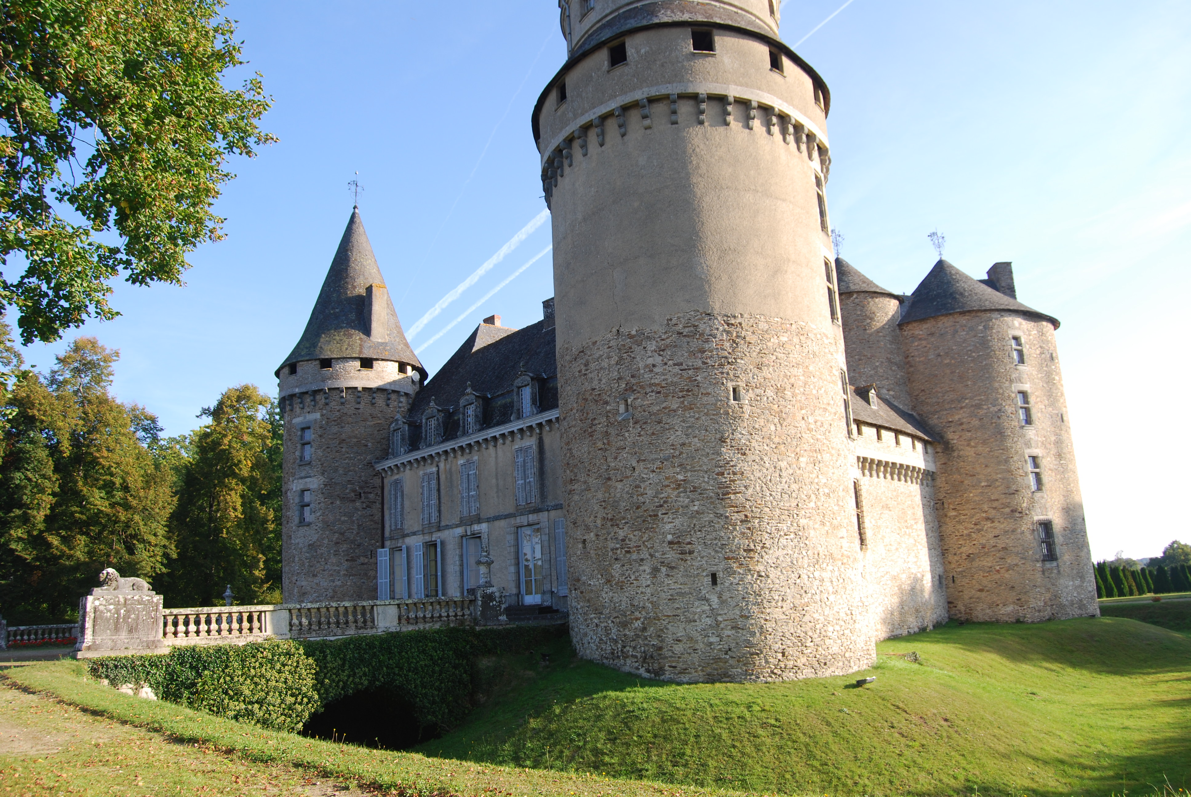 Château de Coussac-Bonneval